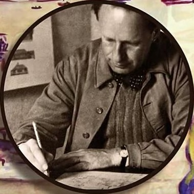 Karl Kohn als Zeichner. Das Bild im Hintergund dürfte vermutlich von ihm stammen und eine Hafenszene in Guayacil darstellen.